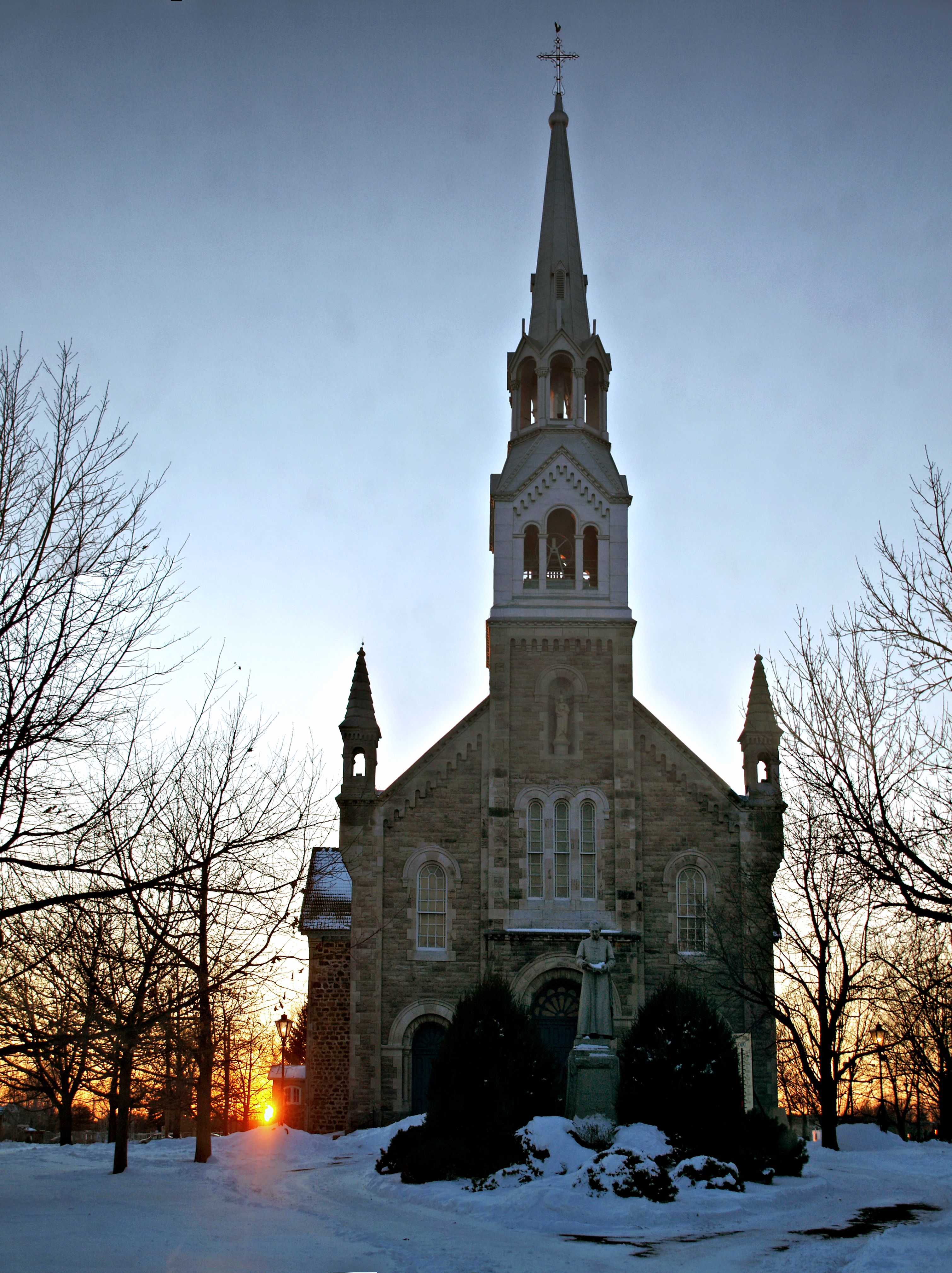 Chambly, Montérégie (Québec) - Église Saint-Joseph de Chambly